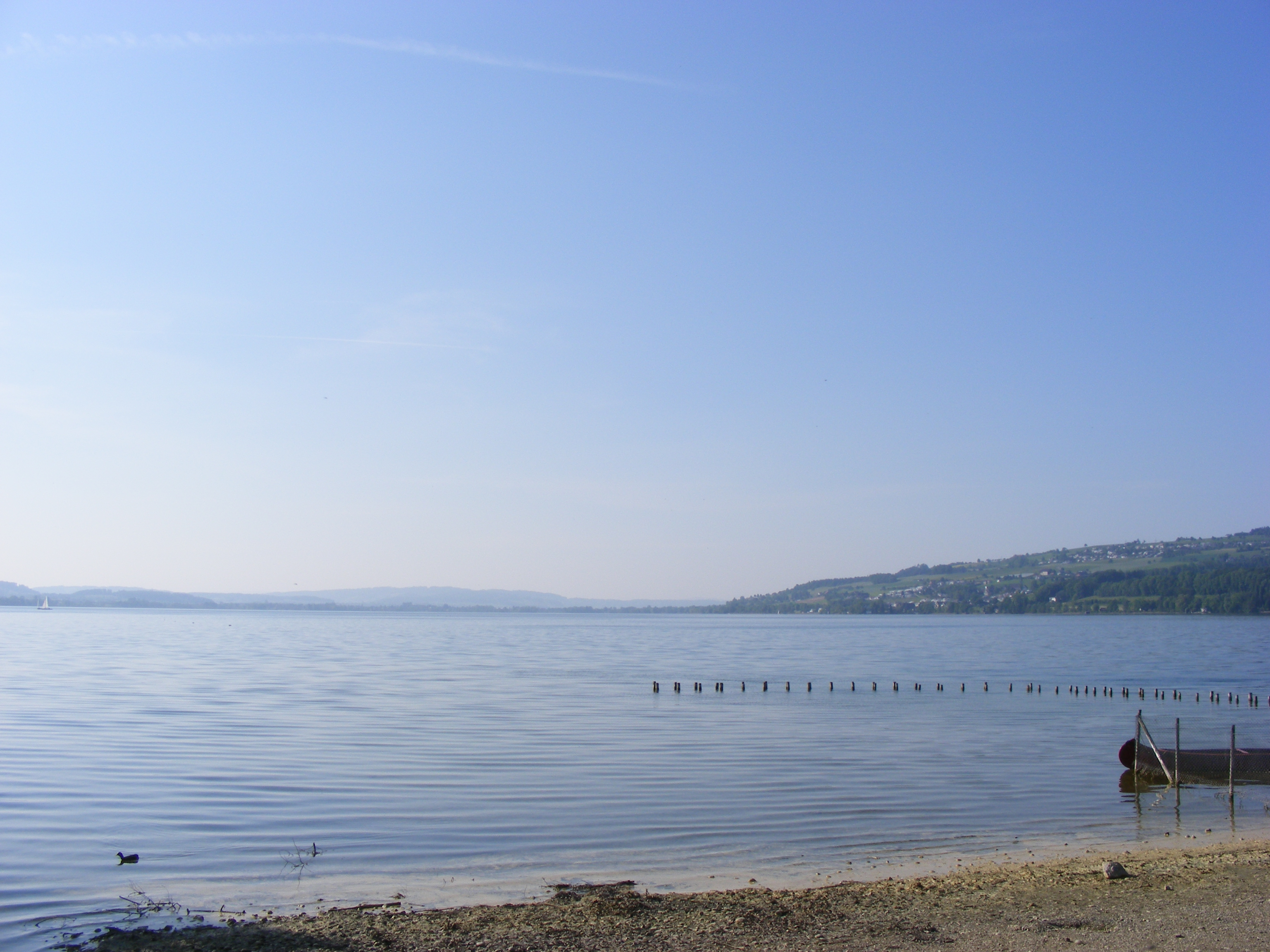 Gezicht op de sempachersee vanaf camping seelandt